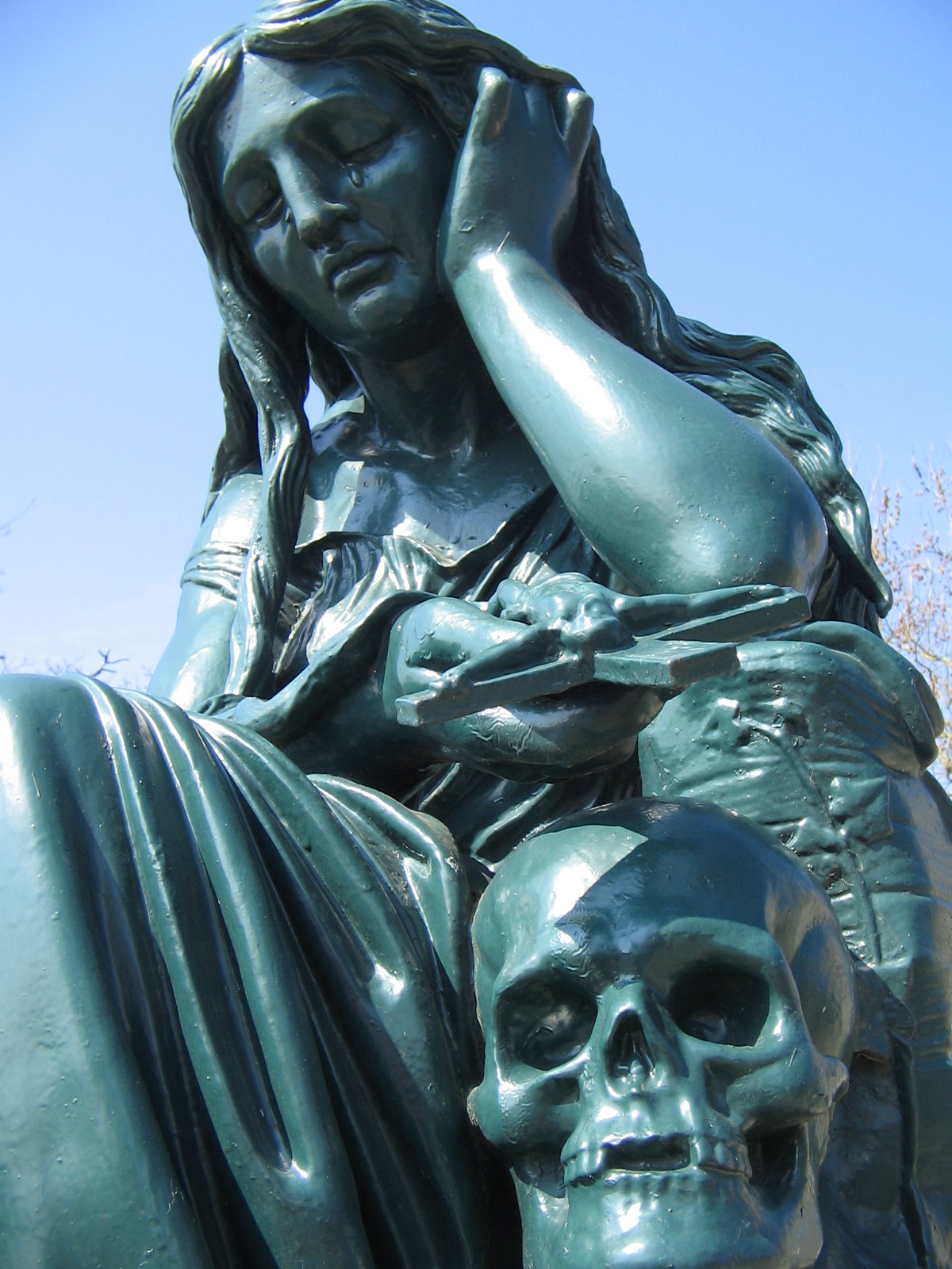 Statue près de la Basilique Notre-Dame de Pitié, La Chapelle-Saint-Laurent, Deux-Sèvres, France